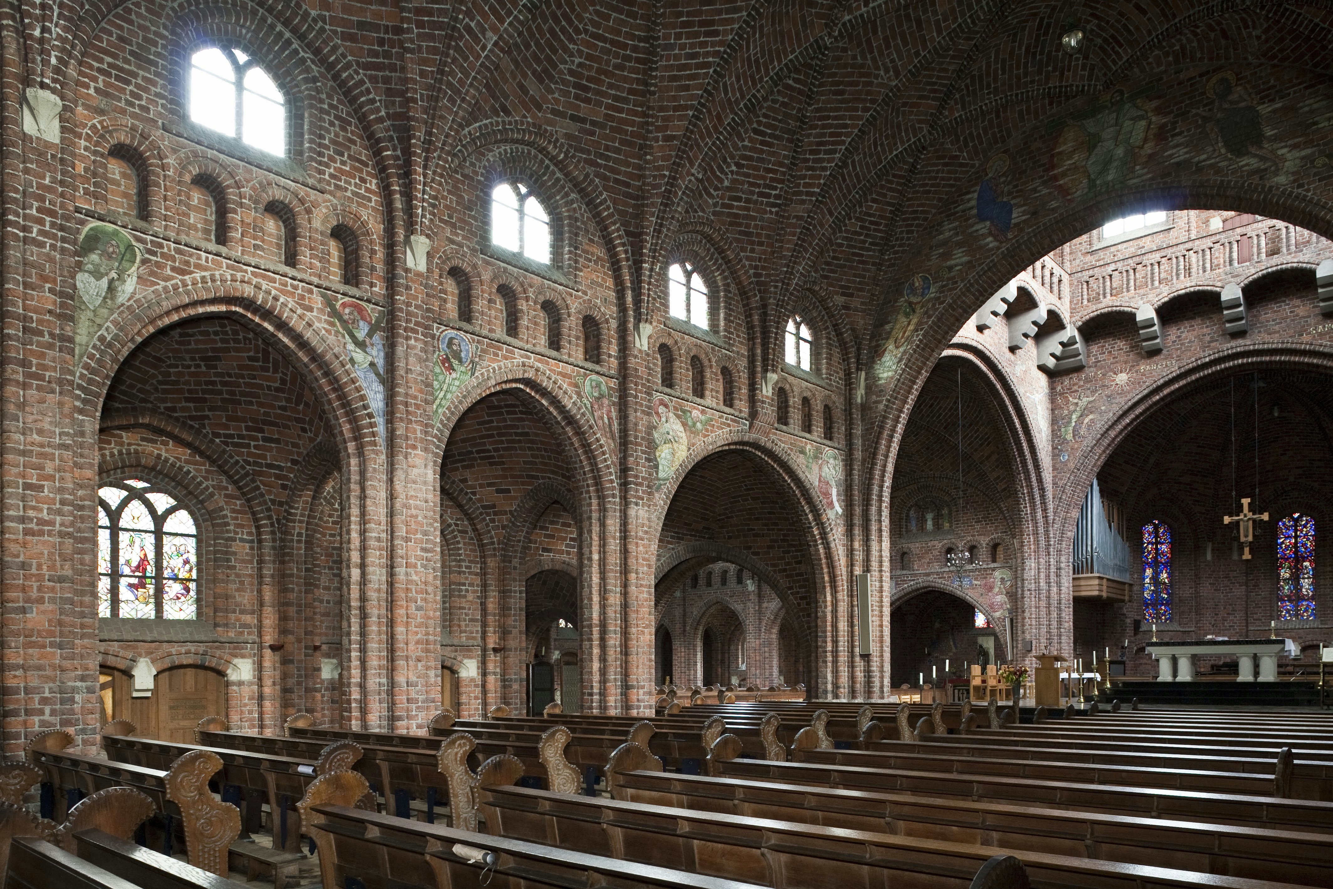 O.L. Vrouw ten Hemelopneming: Interieur, overzicht van de kerk, schip en zicht op het noordelijke transept